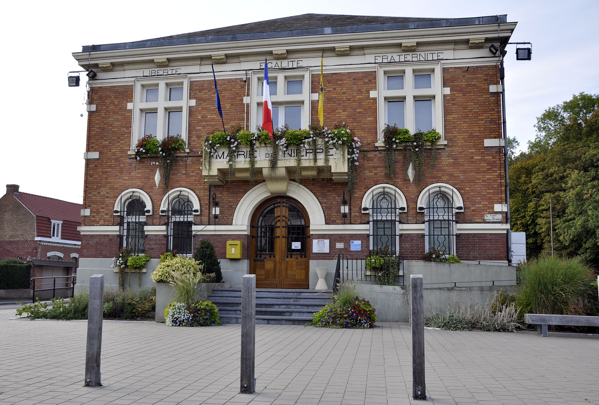 Hôtel de ville du bourg de la ville de Nieppe